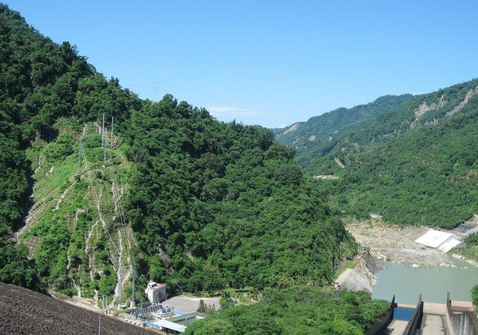 自曾文水庫大壩俯瞰曾文發電廠。此照片由經濟部水利署南區水資源局提供，並同意以創用CC姓名標示 - 相同方式分享於維基百科之上。